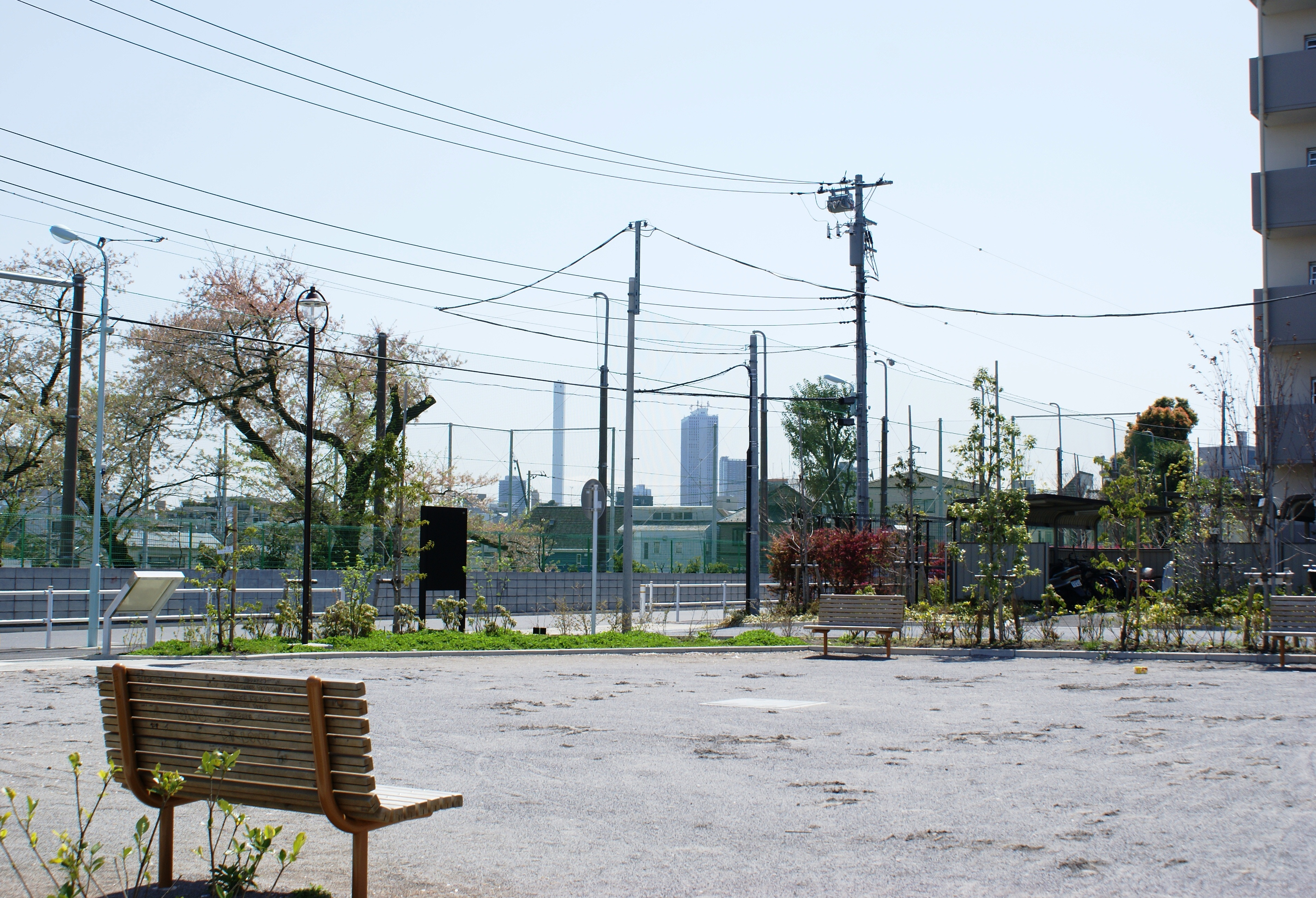 幸町都営アパート